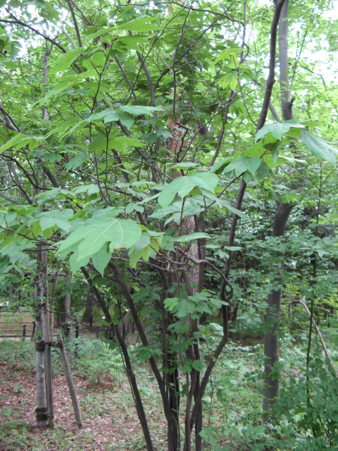 Lindera triloba